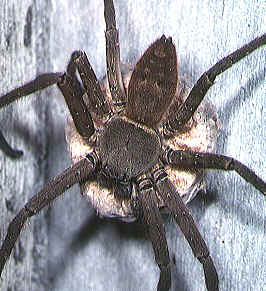 female Heteropoda venatoria from Okinawa.